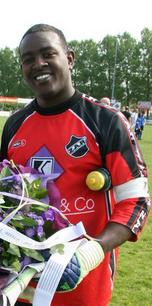 Wencho Farrel